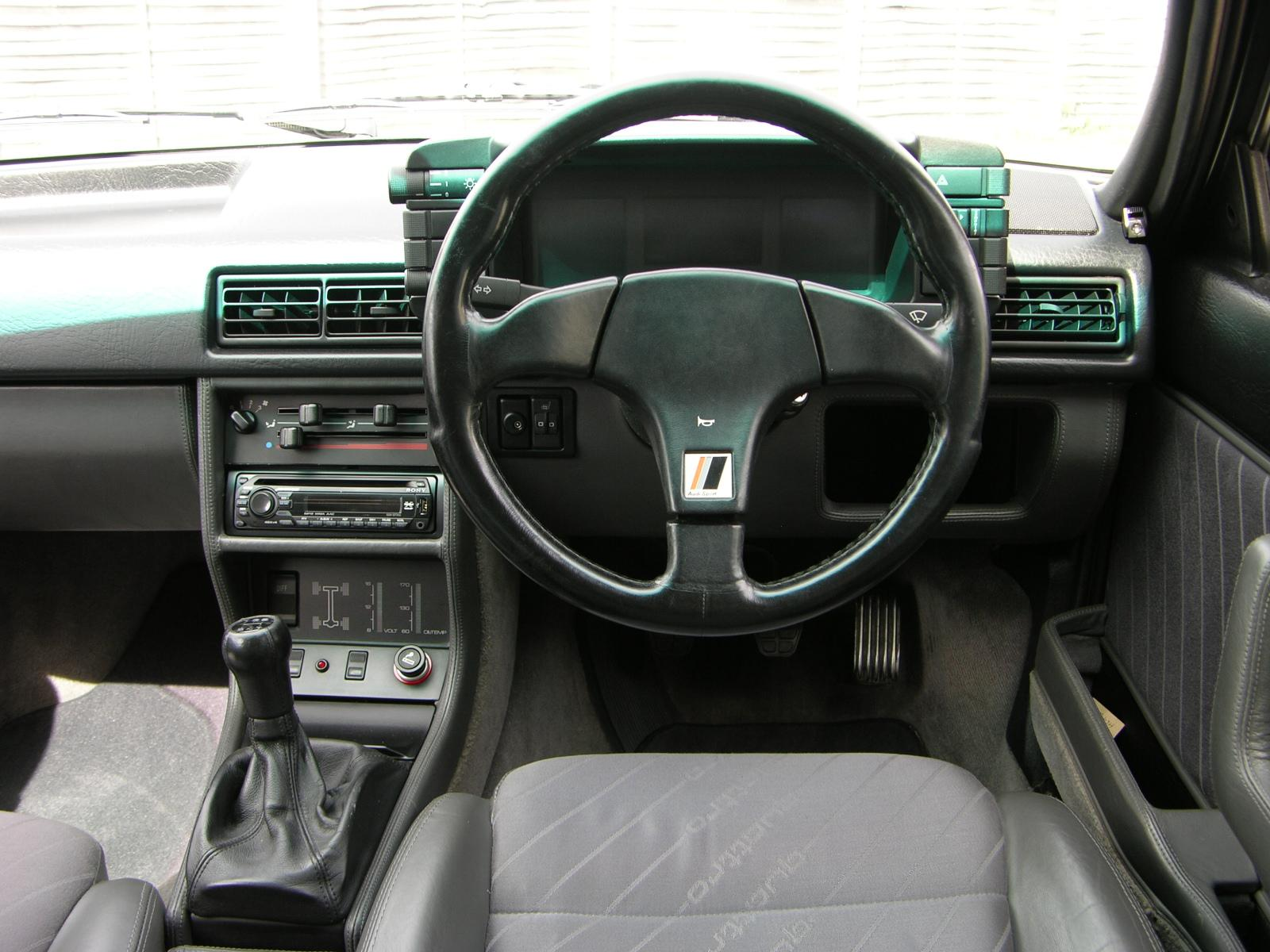 1990 Audi Quattro 20V